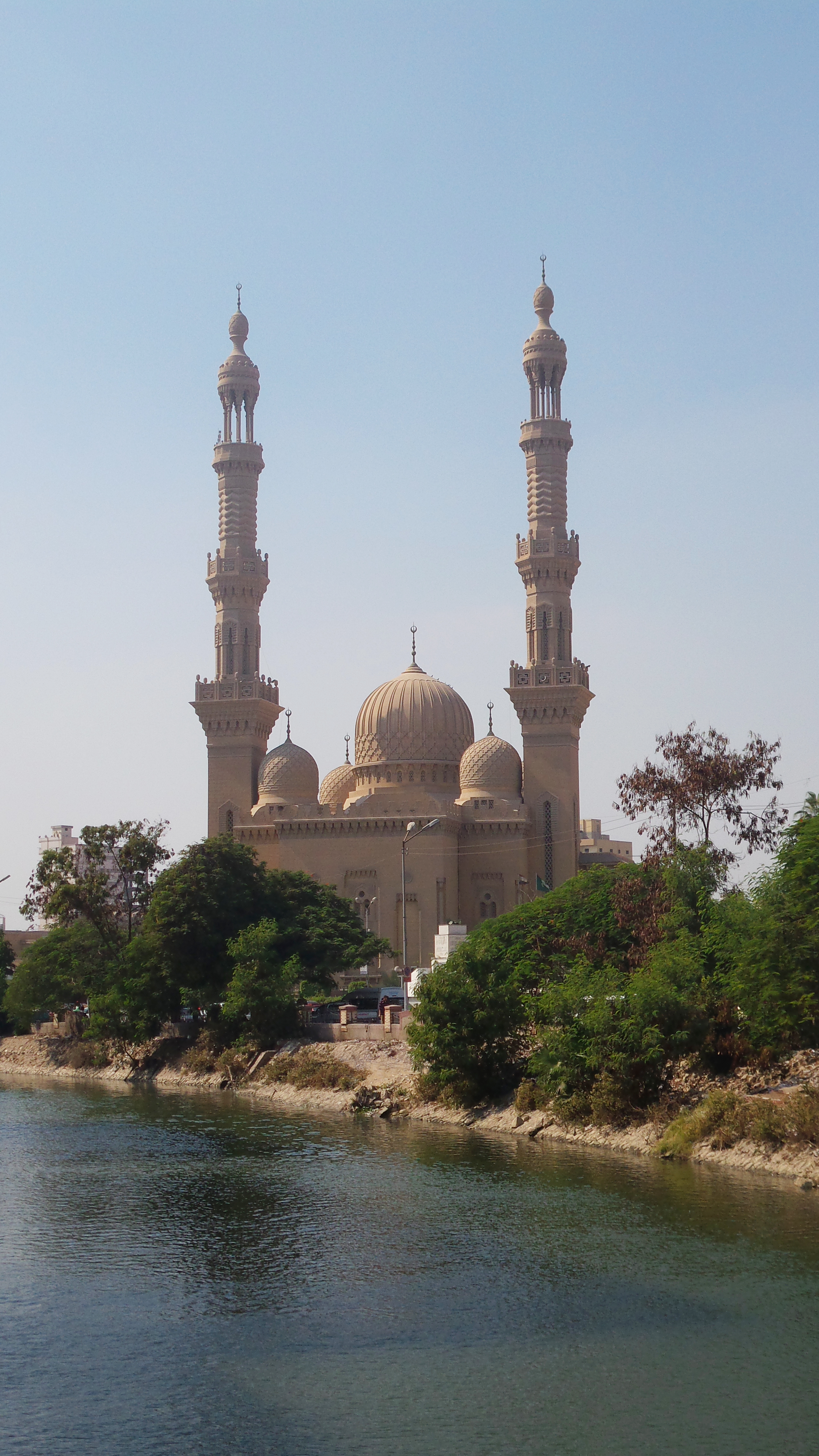 مسجد الفتح بالزقازيق - لقطة من على أحد كباري المشاة على "بحر مويس" بالزقازيق